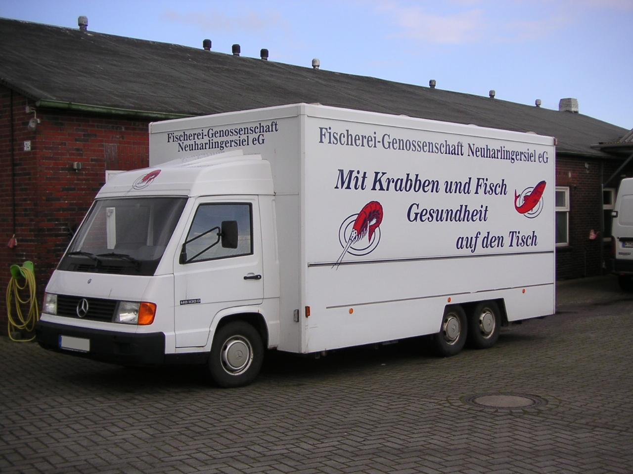 Verkaufswagen auf Basis eines Mercedes-Benz MB 100